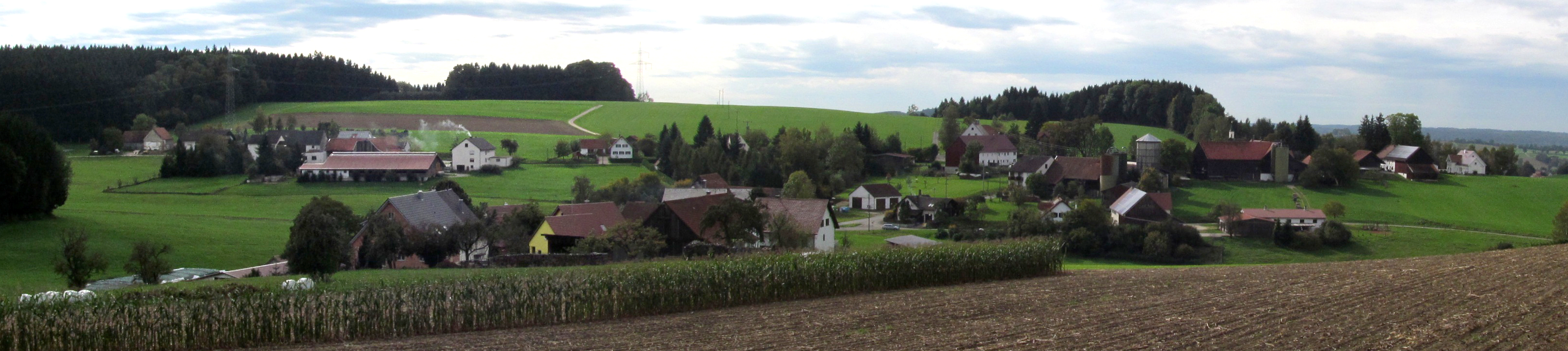 Lauterbach, Ziemetshausen Panoramabild von Osten im Herbst 2014.